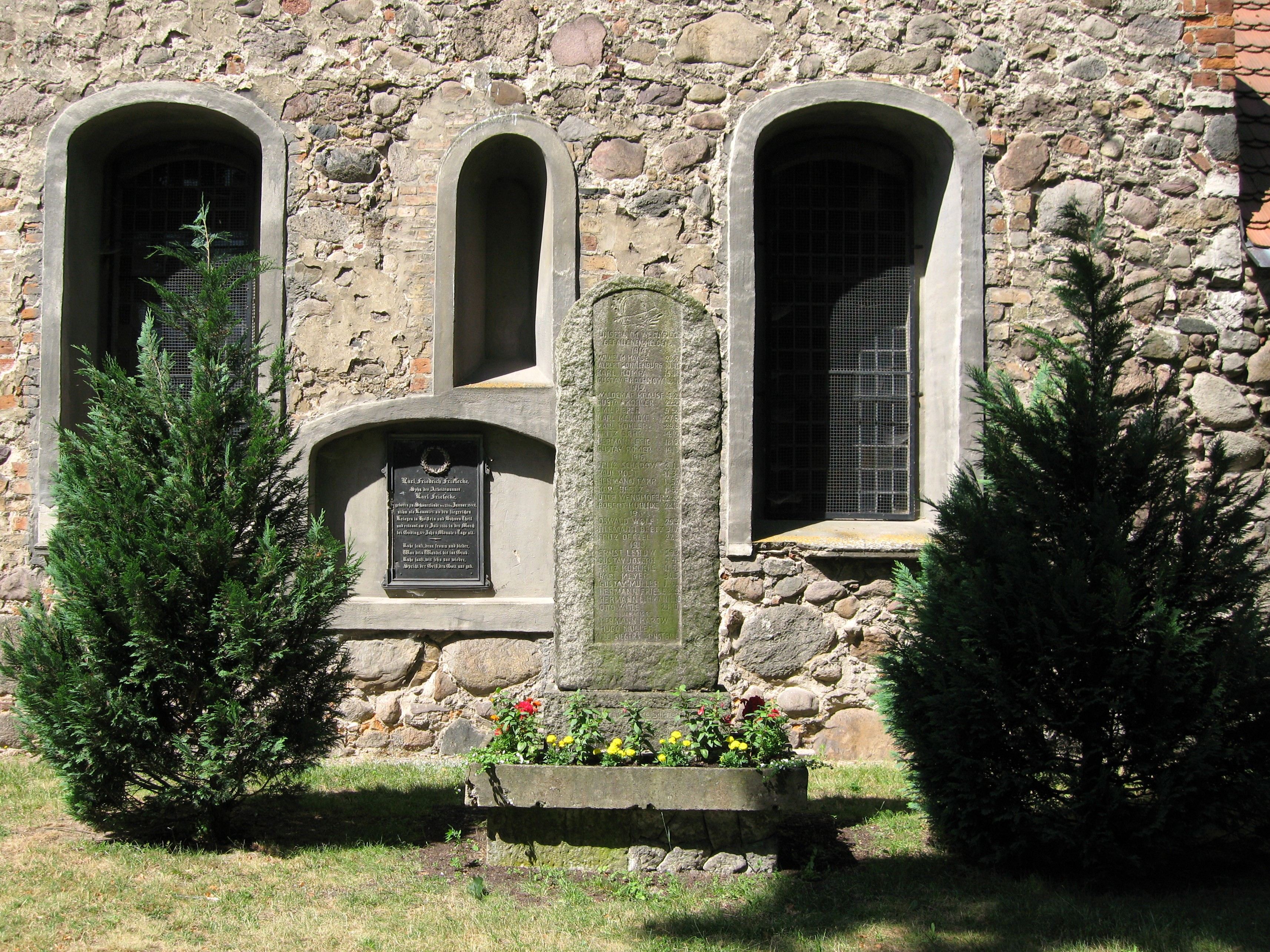 Gefallenendenkmal an der Dorfkirche von Schönerlinde, Gemeinde Wandlitz, Landkreis Barnim, Land Brandenburg, Deutschland